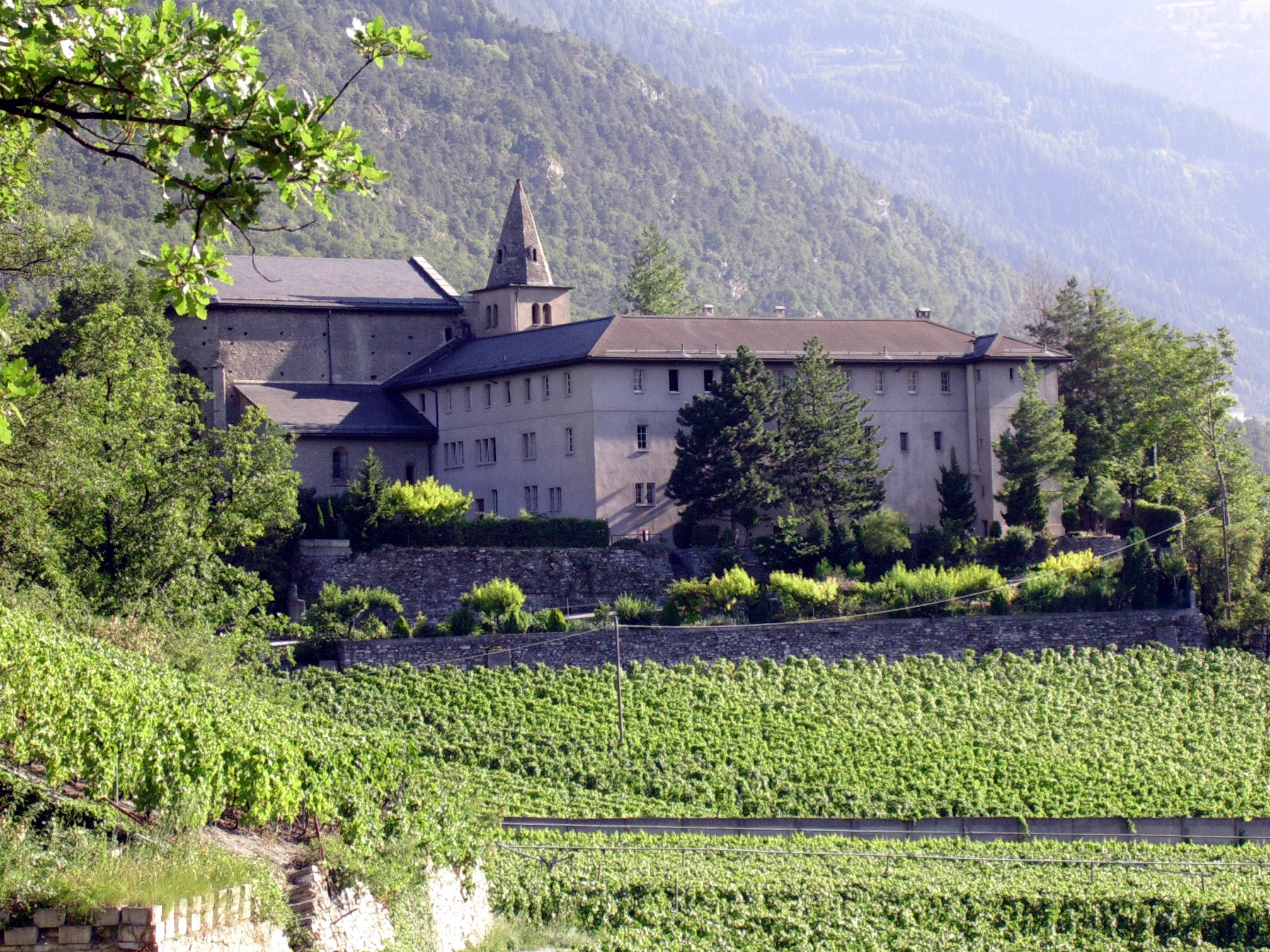 Le Couvent de Géronde